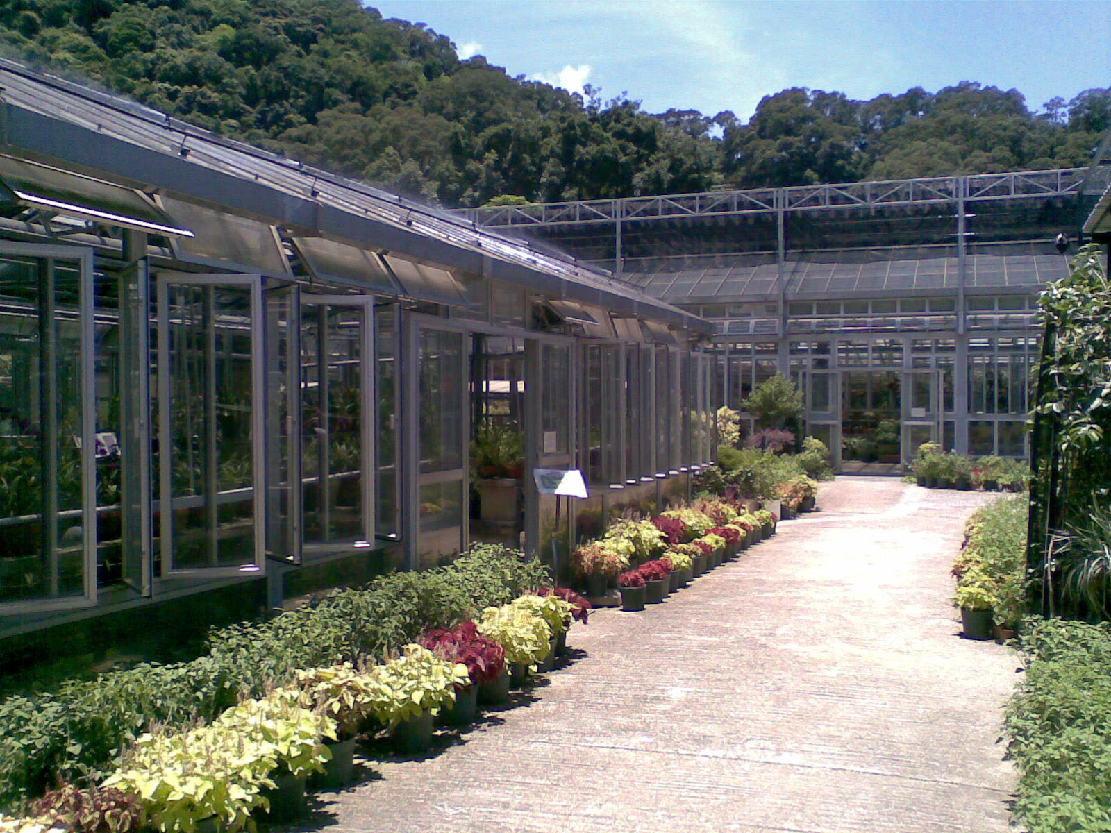 中文（香港）: 嘉道理農場暨植物園溫室